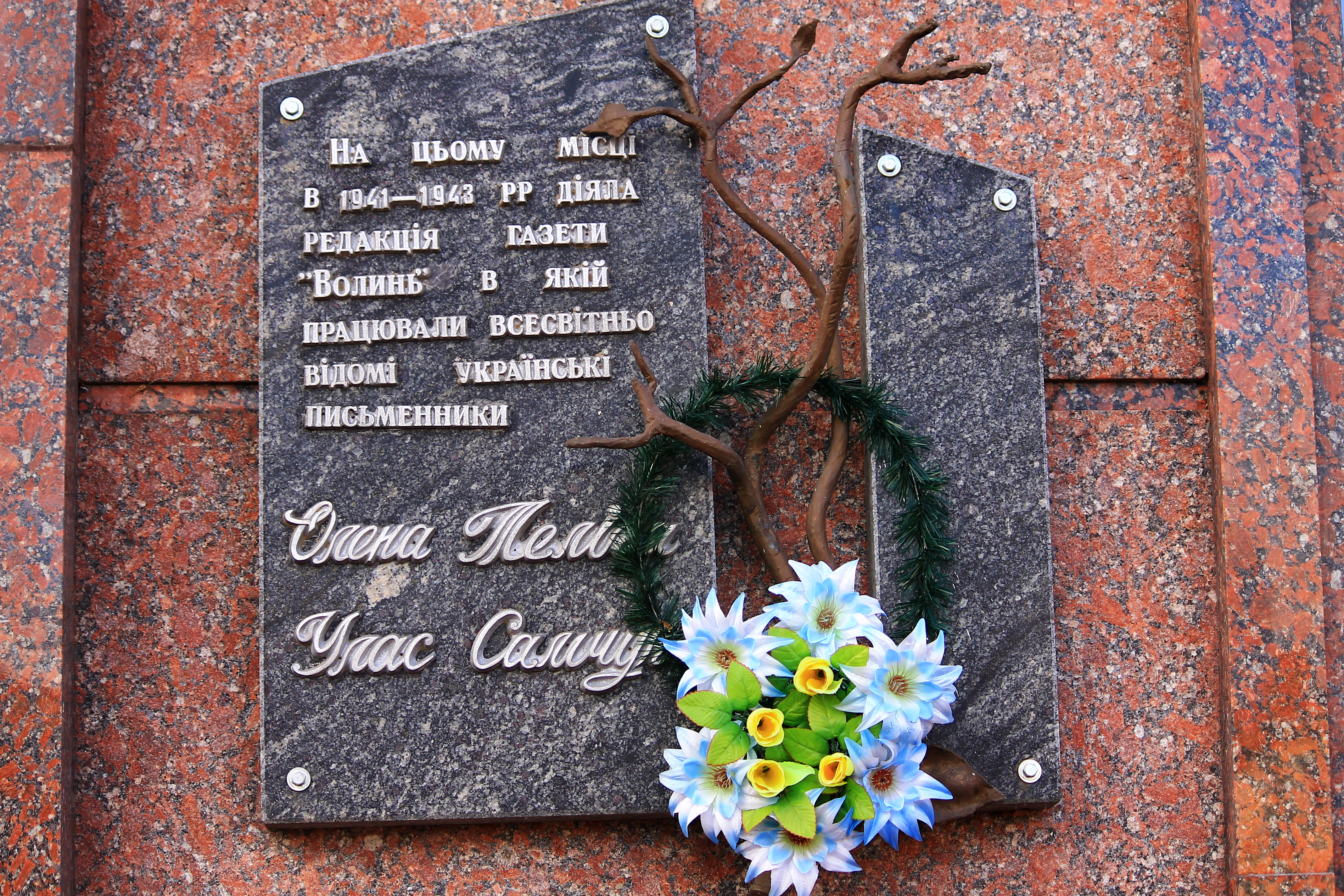 Меморіальна дошка на честь редакції газети «Волинь» та її співробітників Уласа Самчука та Олени Теліги, Рівне, Театральна площа, 61